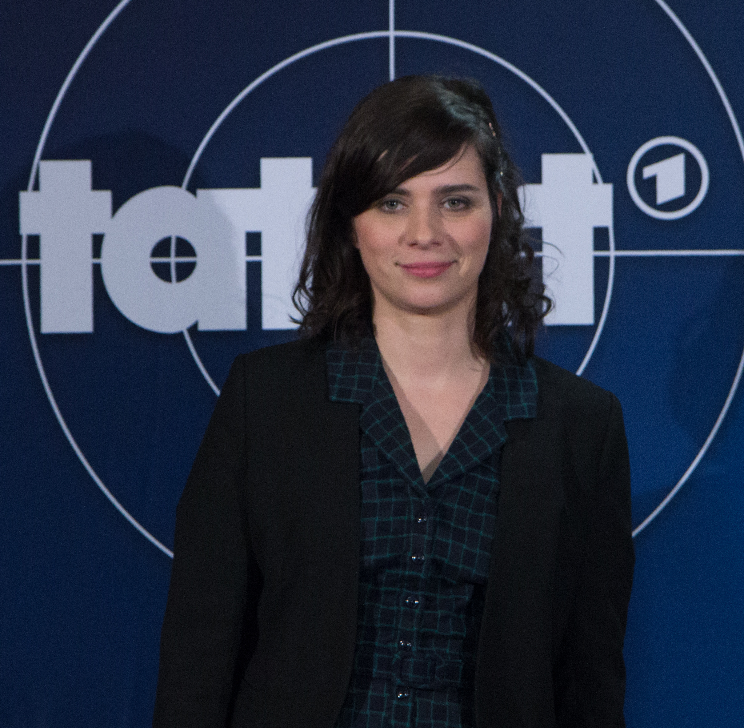 Fotocall im Rahmen der Preview des Tatorts „Der wüste Gobi“ u.a. mit Nora Tschirner.